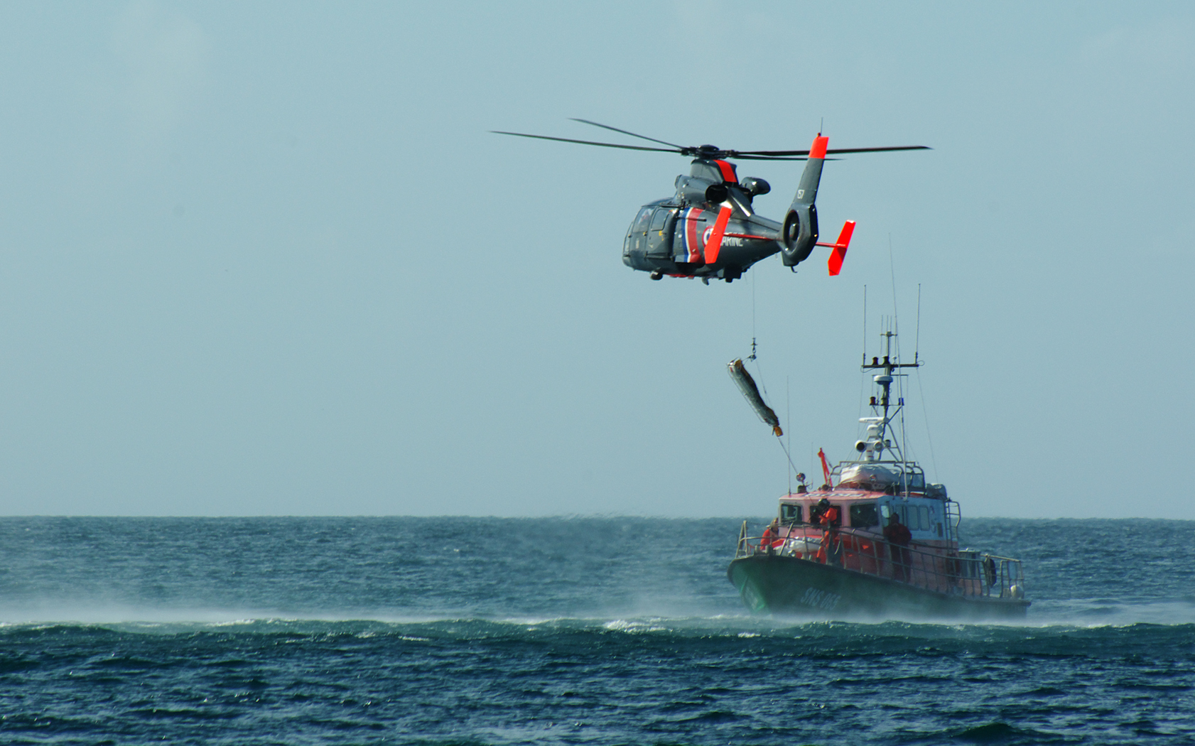 Démonstration conjointe de la SNSM et de la Marine Nationale. L'hélicoptère porte les bandes du service public